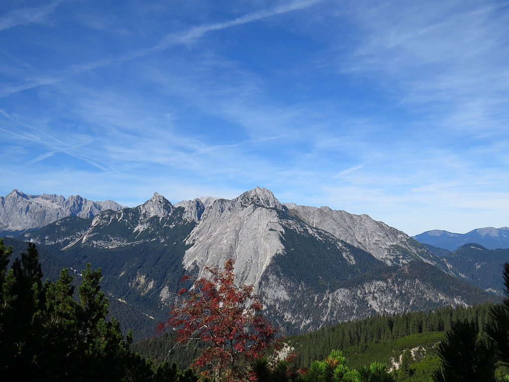 Die Große Arnspitze ist der Hauptgipfel der Arnspitzgruppe im Wettersteingebirge